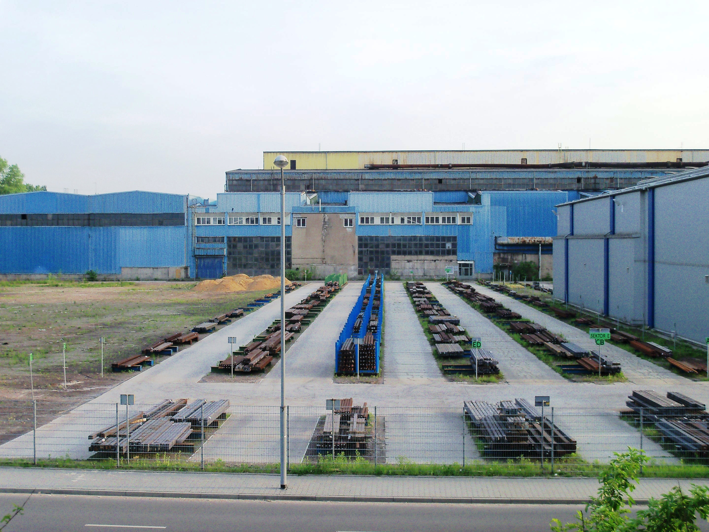 Huta Baildon w Katowicach